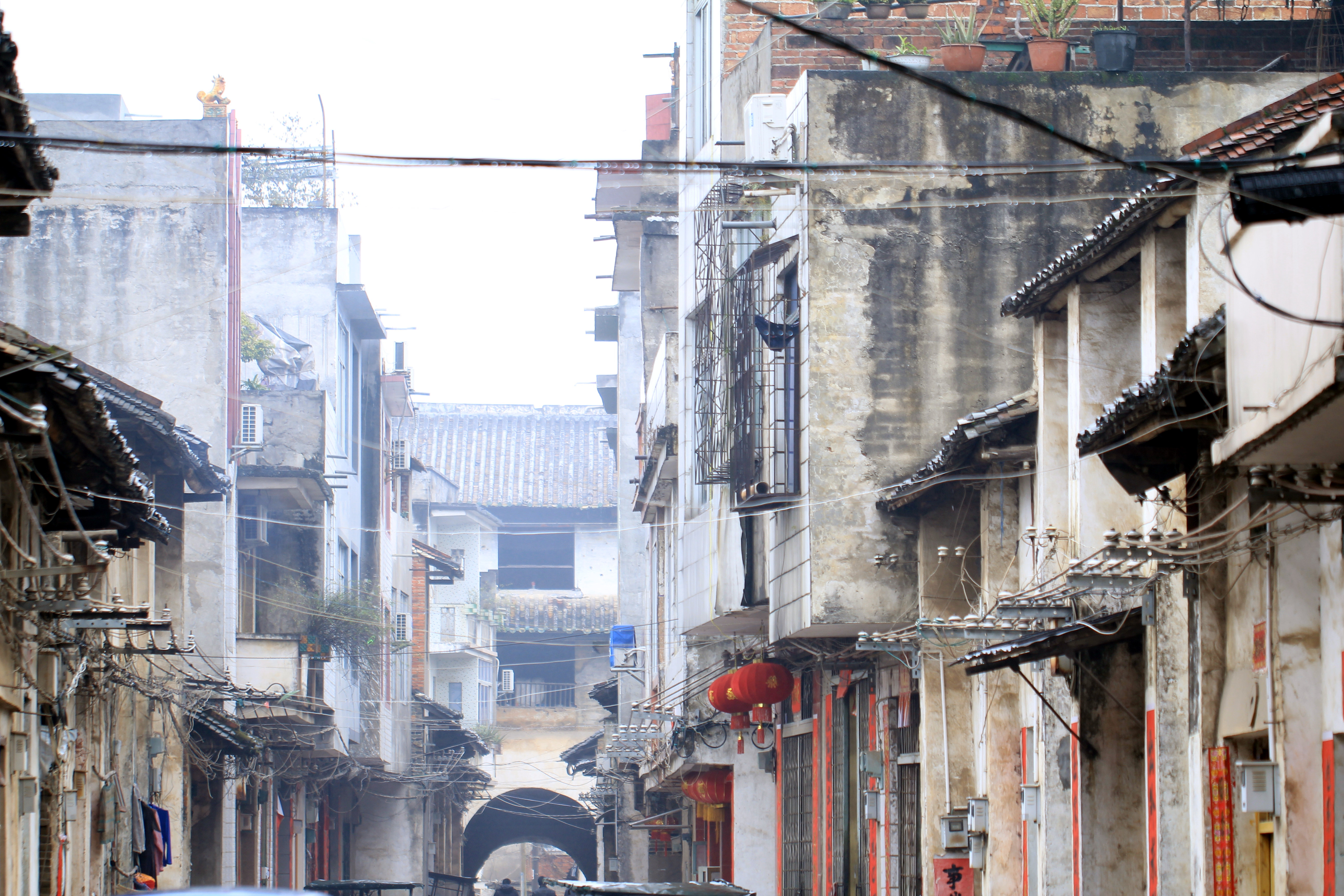 中国广西柳州市武宣县老街区